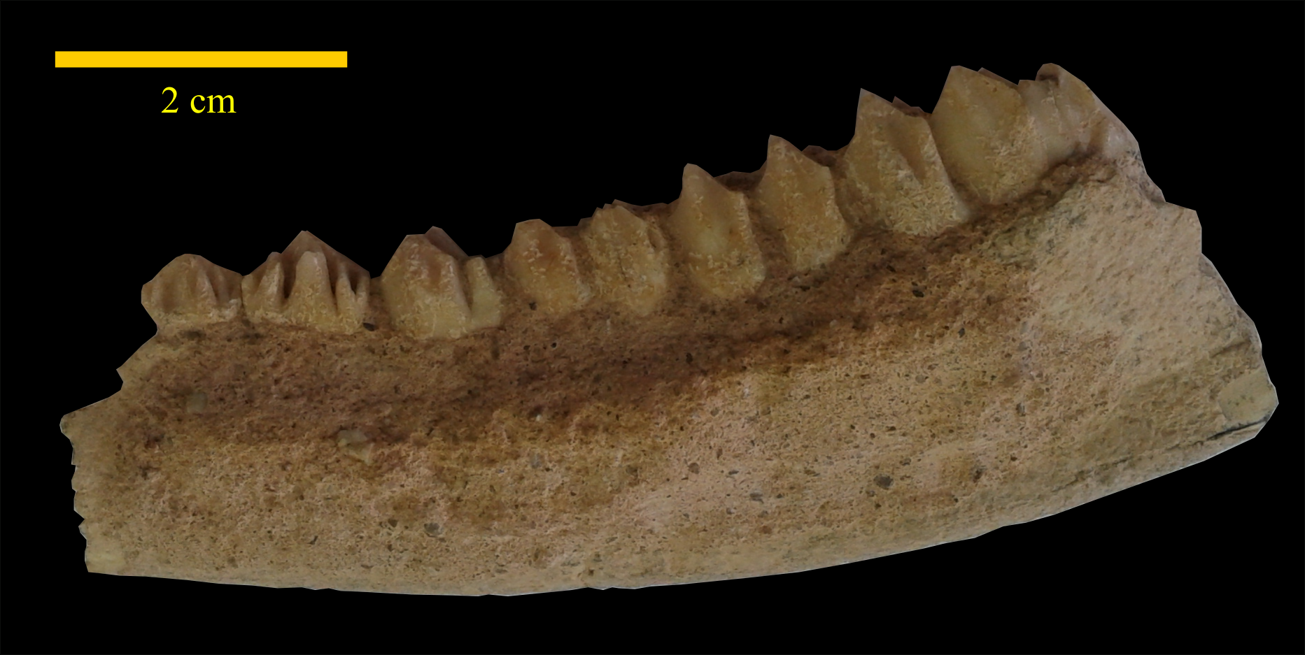 Dentari de Croizetoceros ramosus (Pleistocè). Mostra procedent de Villarroya, La Rioja (Espanya).